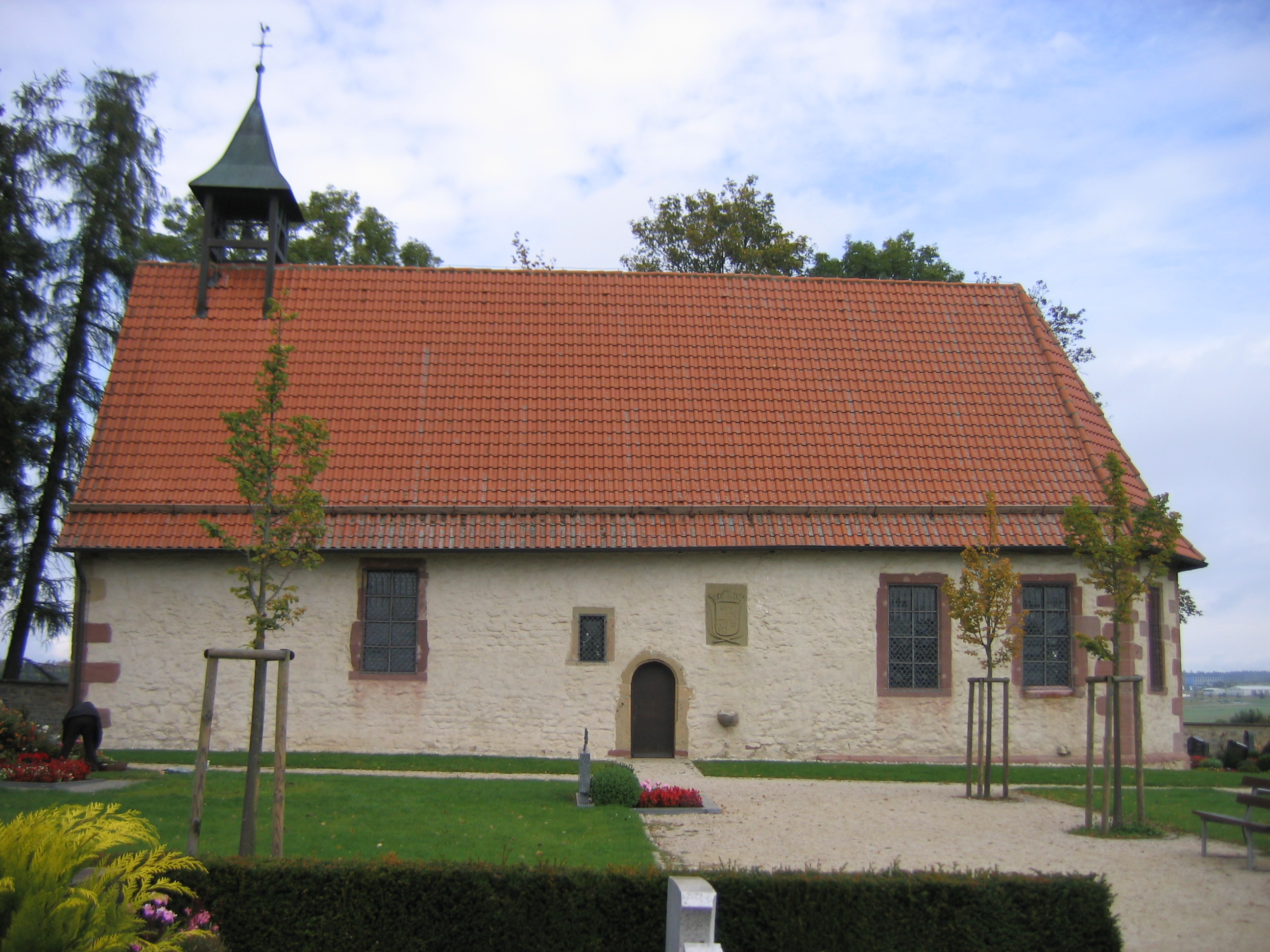 Londorfer Kapelle, near Vollmaringen, Lkr. Calw, Baden-Württemberg, Germany, southside